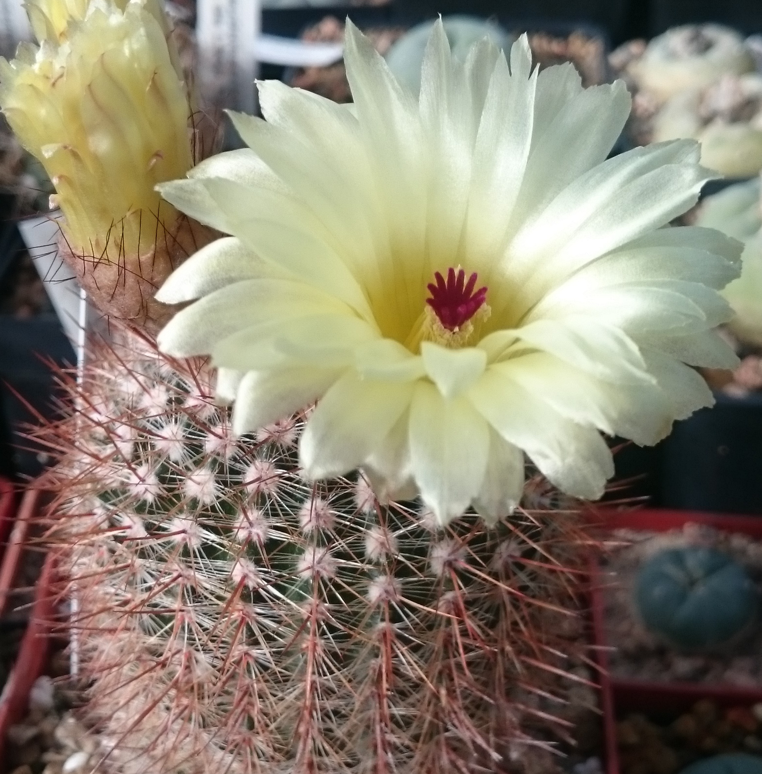 Notocactus eugeniae